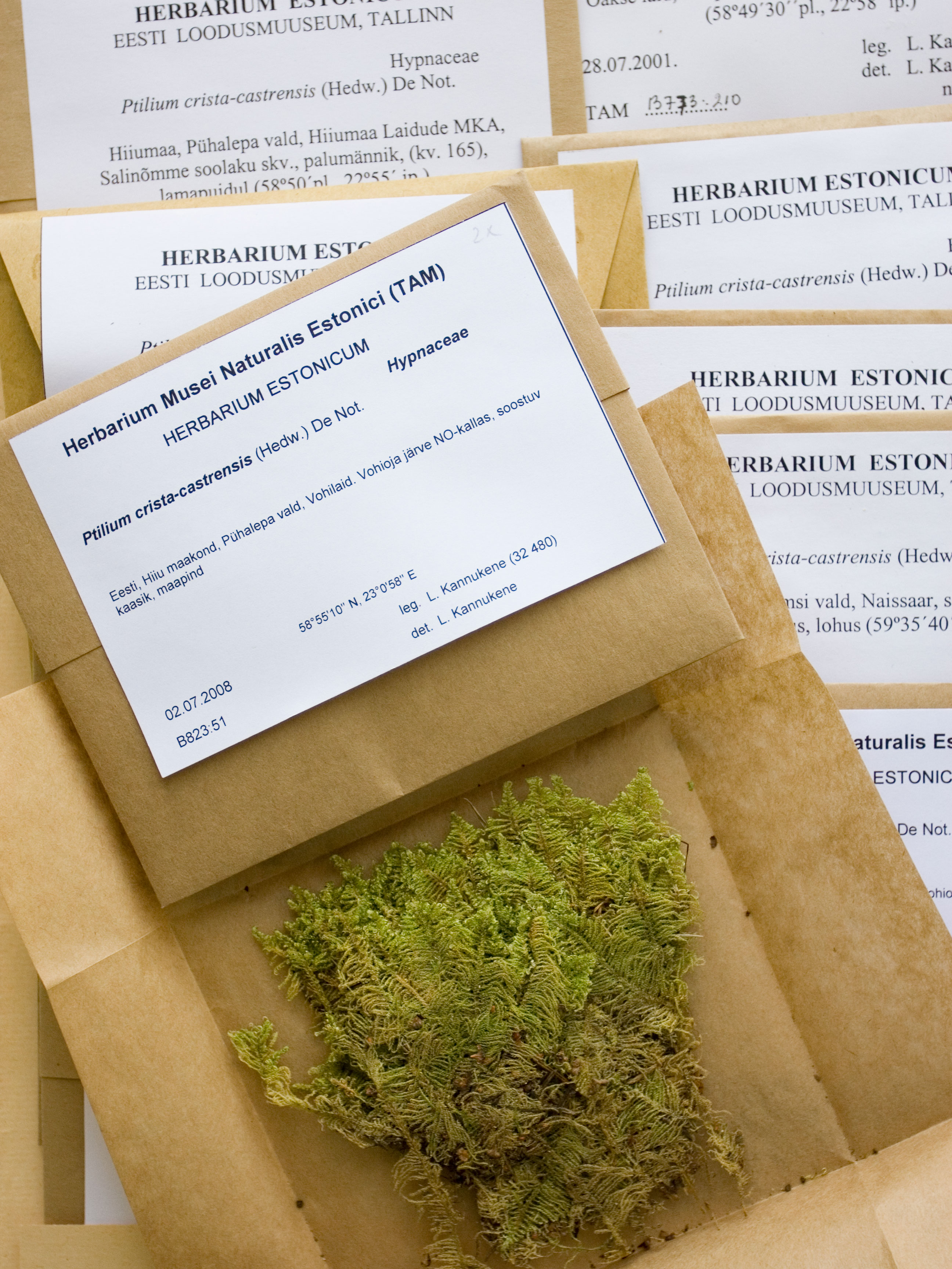 Eesti Loodusmuuseumi botaanilised kogud